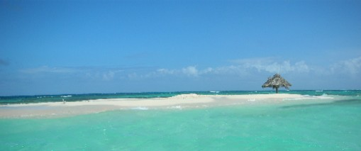 Ile Morpion, Grenadines, Caraïbes.